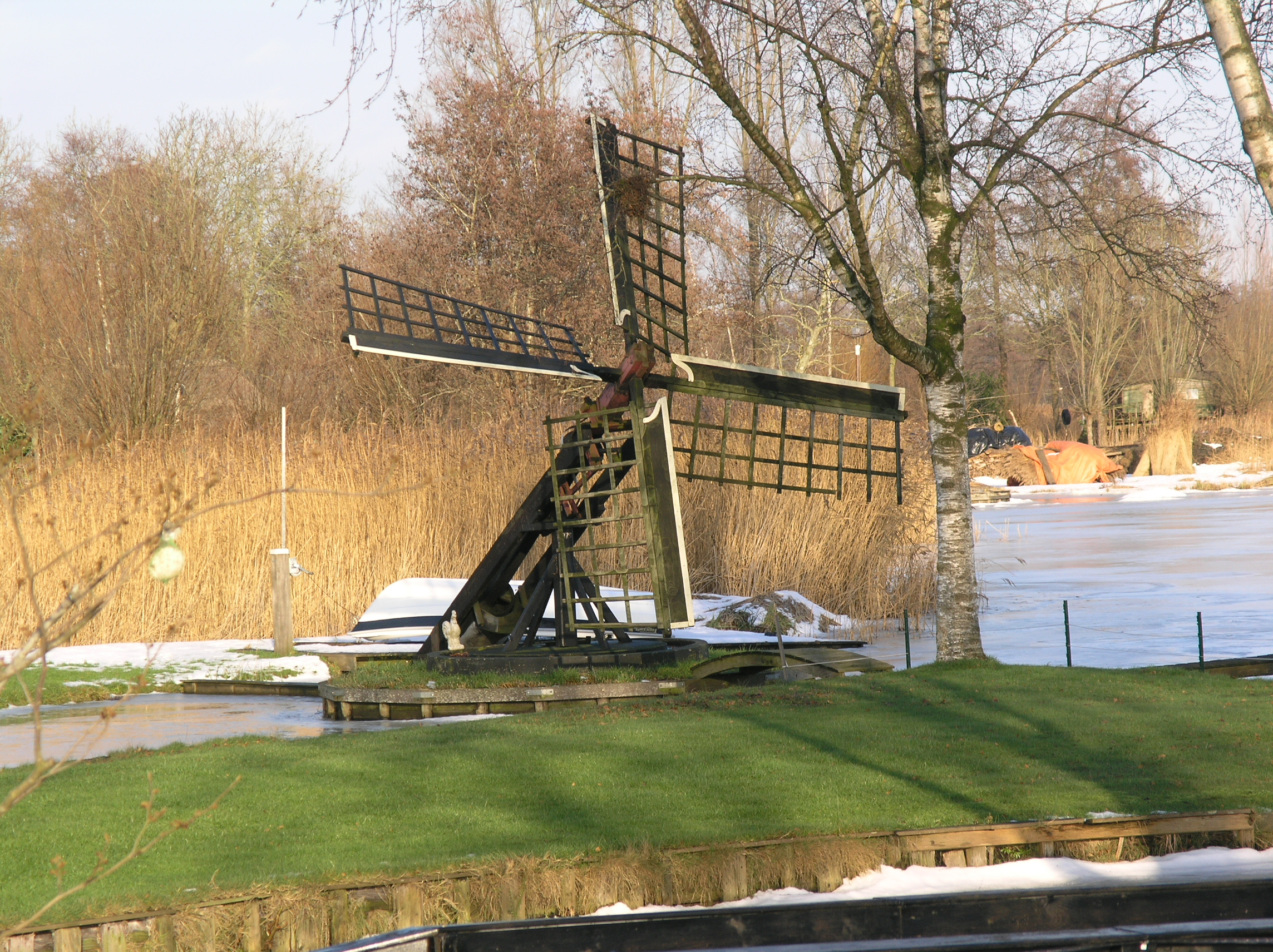 Giethoorn Tjasker Molengat